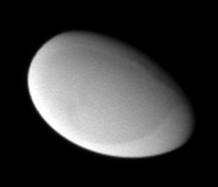 Saturni kuu Methone